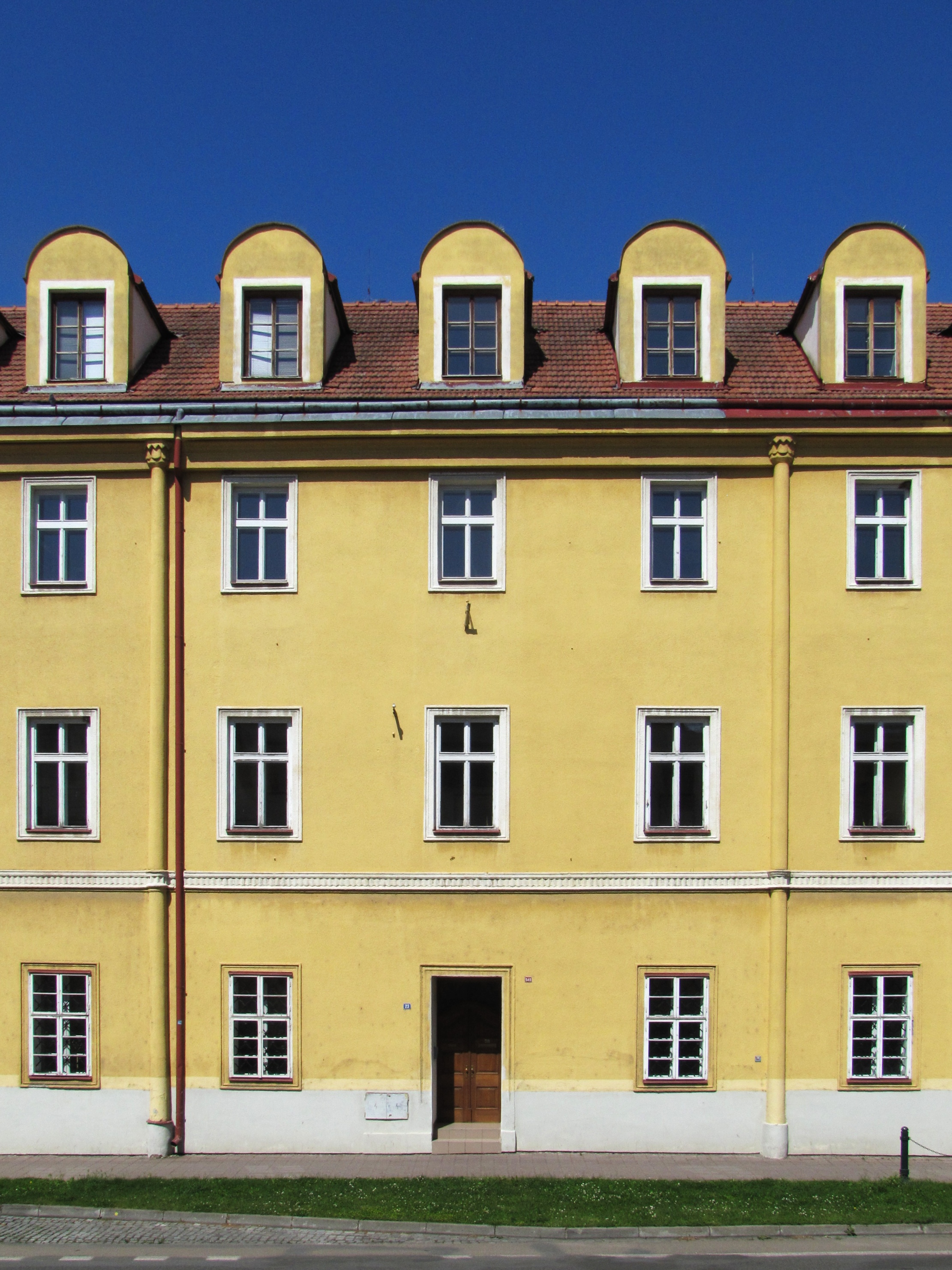 Budova Klvaňova gymnázia v Kyjově - nejstarší část původní piaristické koleje